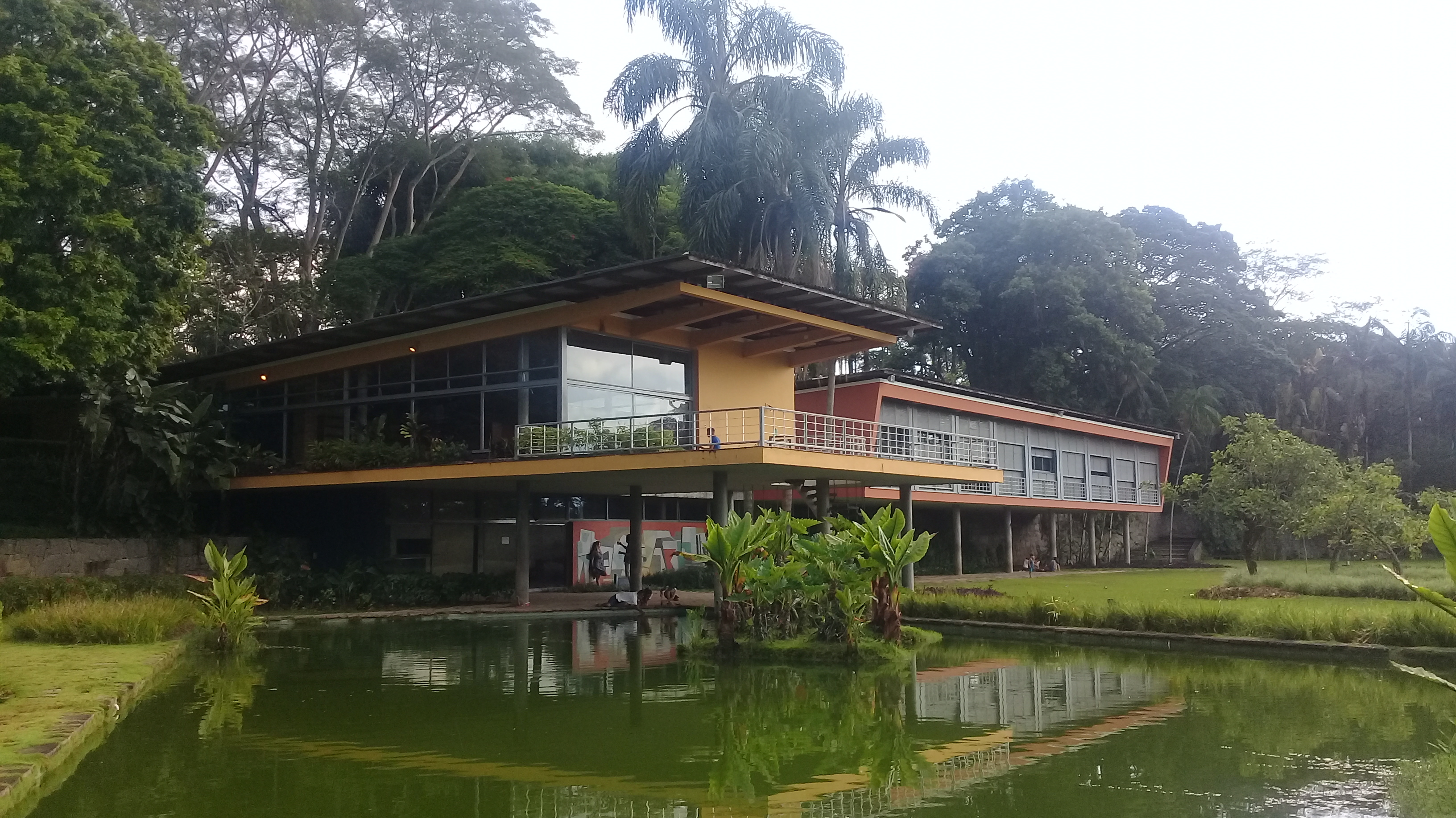 Bem tombado pelo CONDEPHAAT na cidade de São José dos Campos Cultural property Residência de Olívio Gomes e Parque Ajardinado, São José dos Campos, São Paulo (state), Brazil Q67168458, P727: CONDEPHAAT ID: residencia-de-olivio-gomes-e-parque-ajardinado